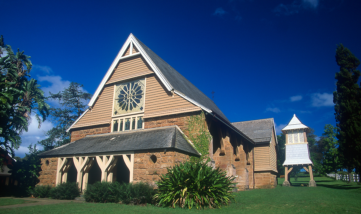 Norfolk Island Melonesian Chapel.